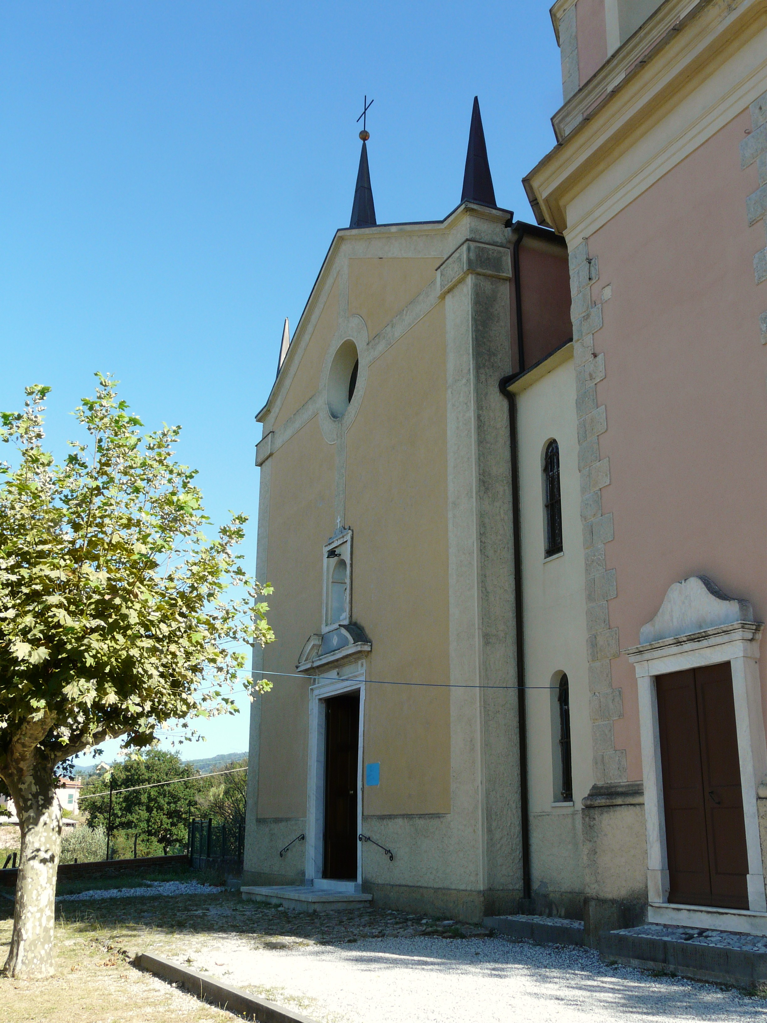 Santuario di Nostra Signora delle Grazie di Ponzano Magra, Santo Stefano di Magra, Liguria, Italia